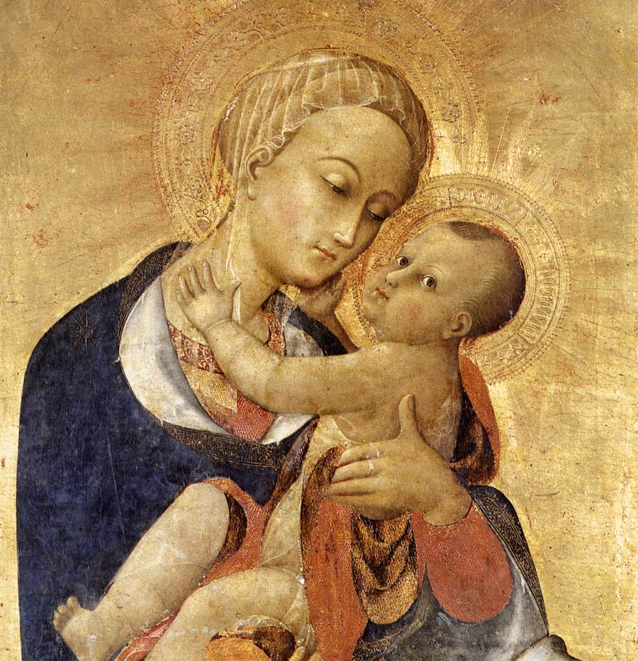 detail